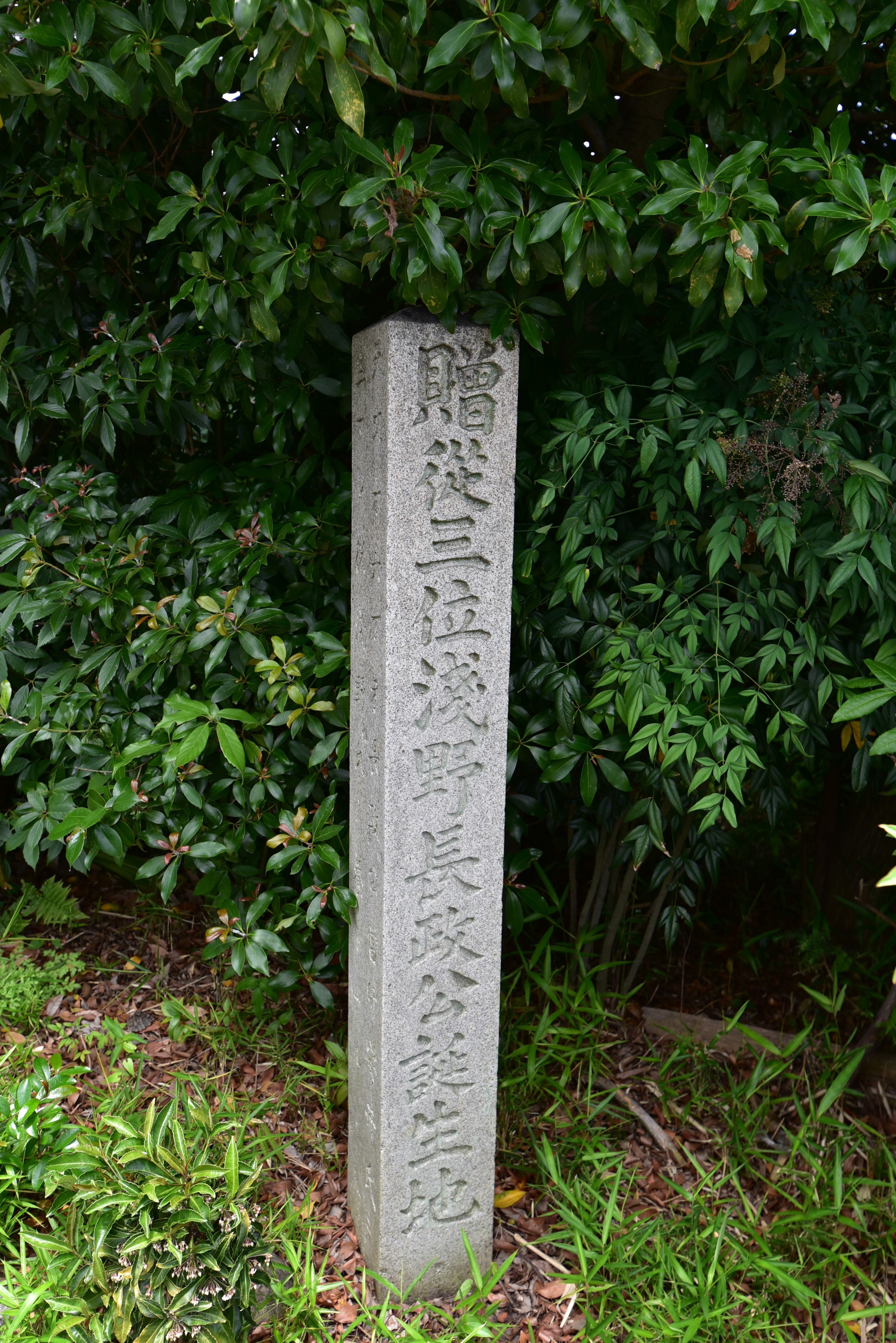 浅野長政誕生地碑（北名古屋市の霊松寺）